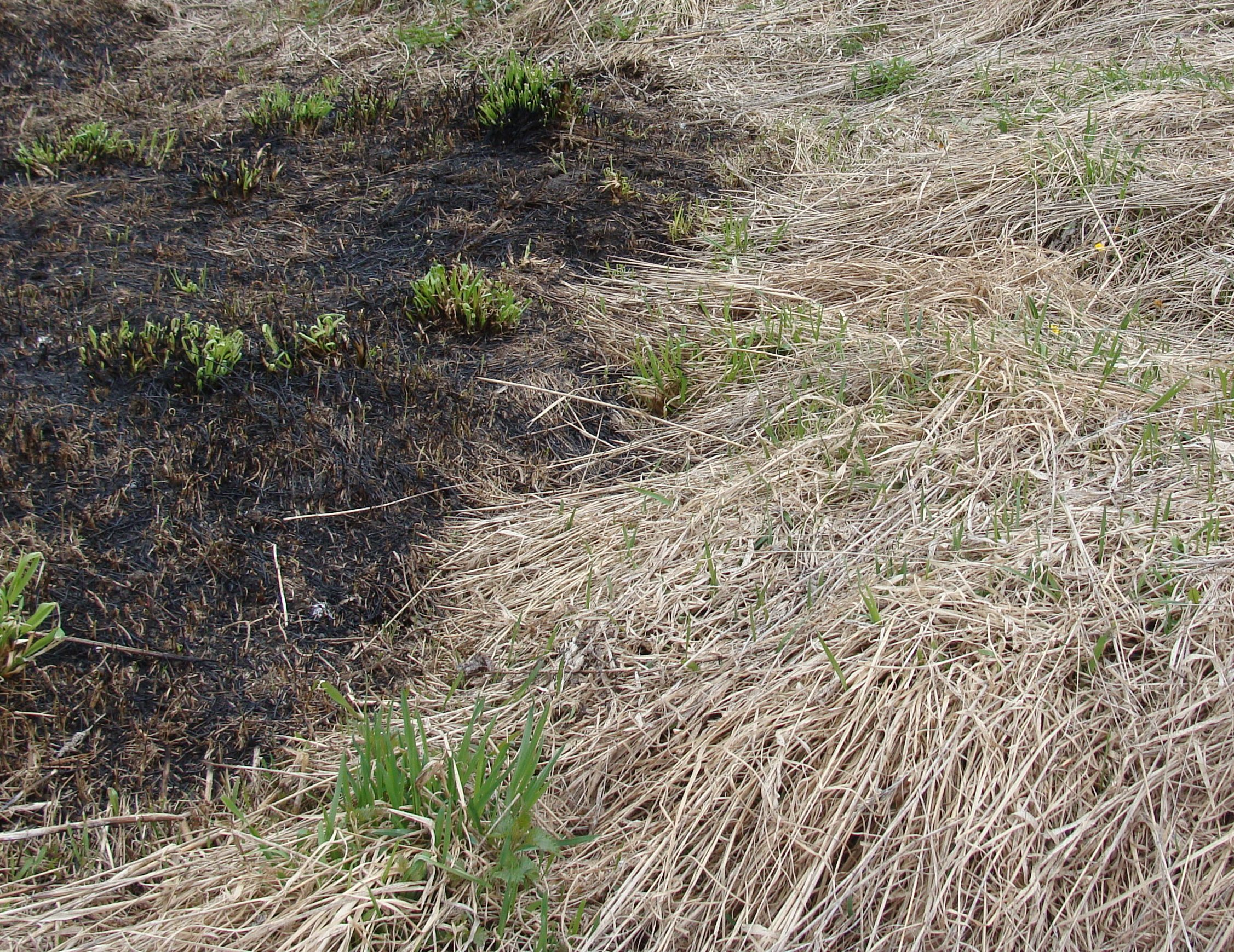 Граница следов пала и прошлогодней травы.